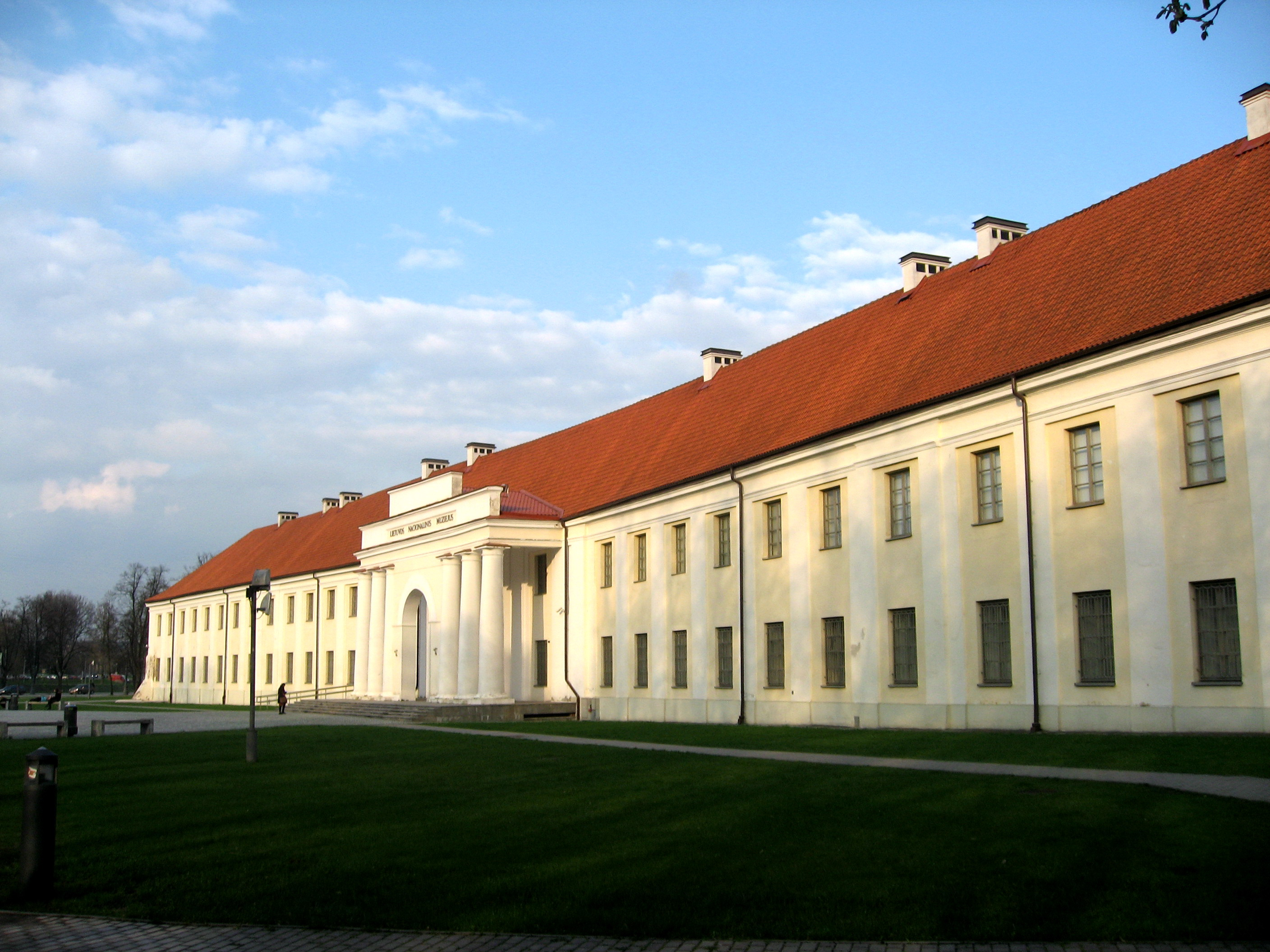 Vilnius, Národní muzeum